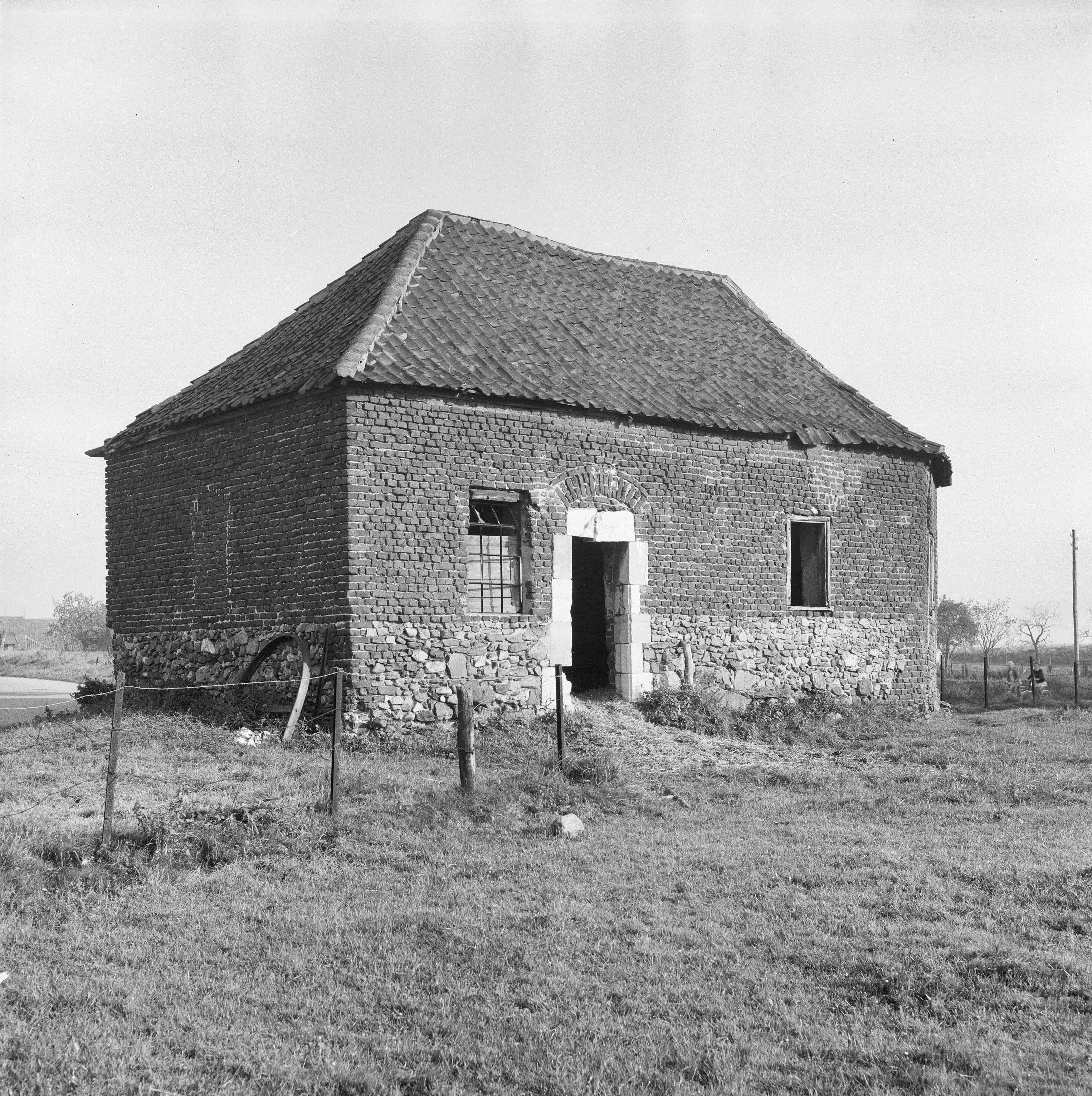 Voormalig Kapel: exterieur